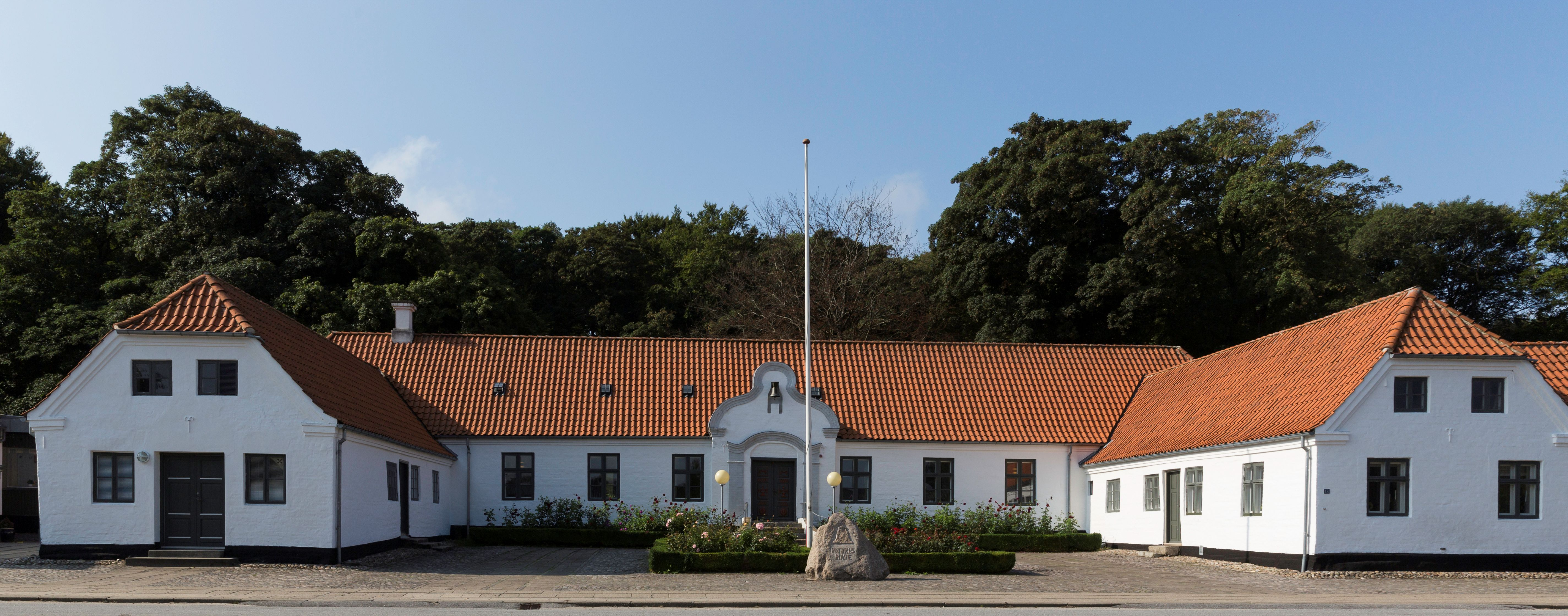 Højris (i dag er navnet "Højris Have") i Ikast